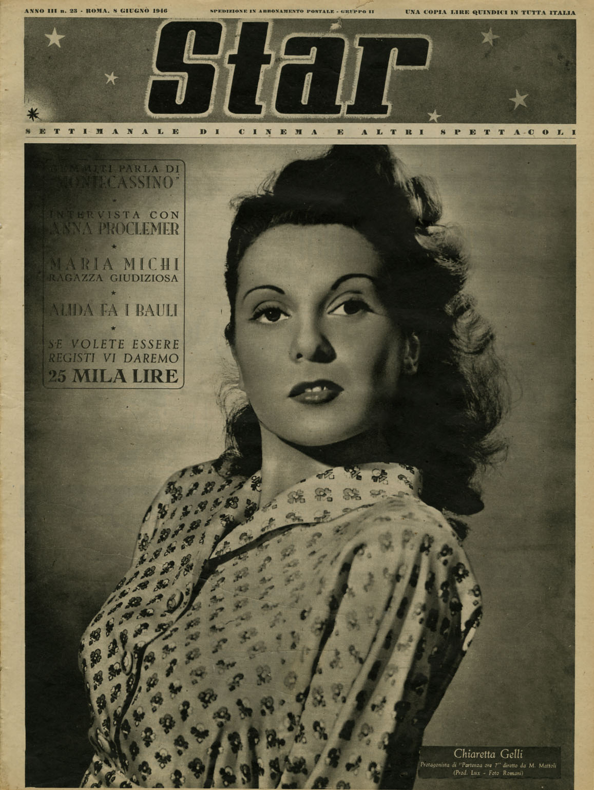 Chiaretta Gelli attrice sulla copertina di Star 1946